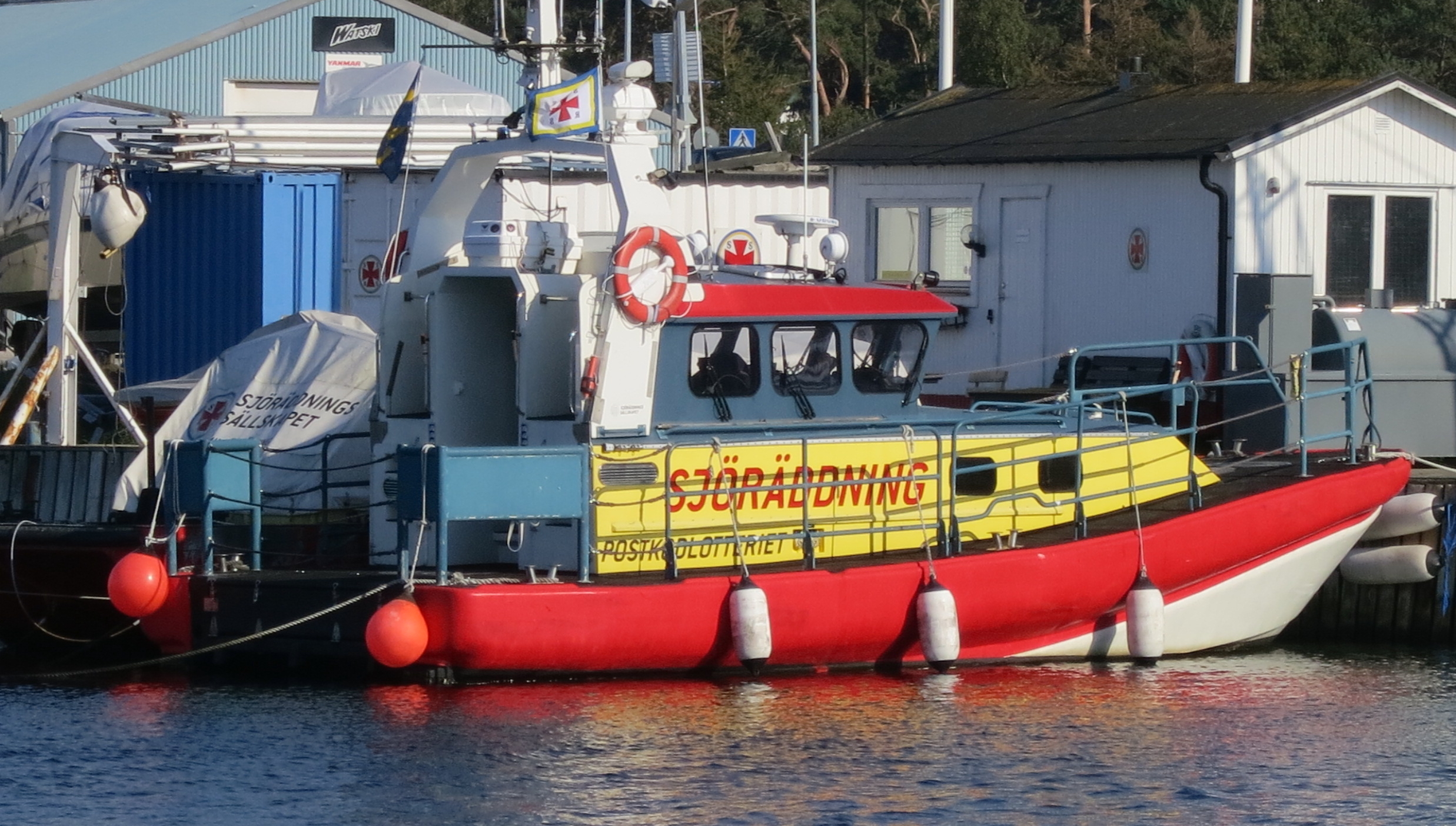 Rescue Postkodlotteriet, sjöräddningsfarkost